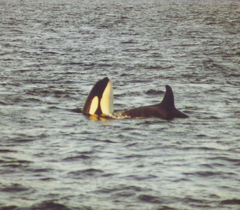 Orcas im Tyfjord, Winter 2001